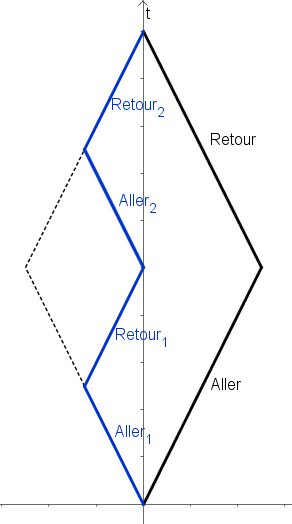 Schéma illustrant le fait qu'un jumeau faisant 2 voyages et subissant 2 fois plus d'accélérations vieillit de la même manière qu'un jumeau faisant un seul voyage avec 2 fois moins d'accélération